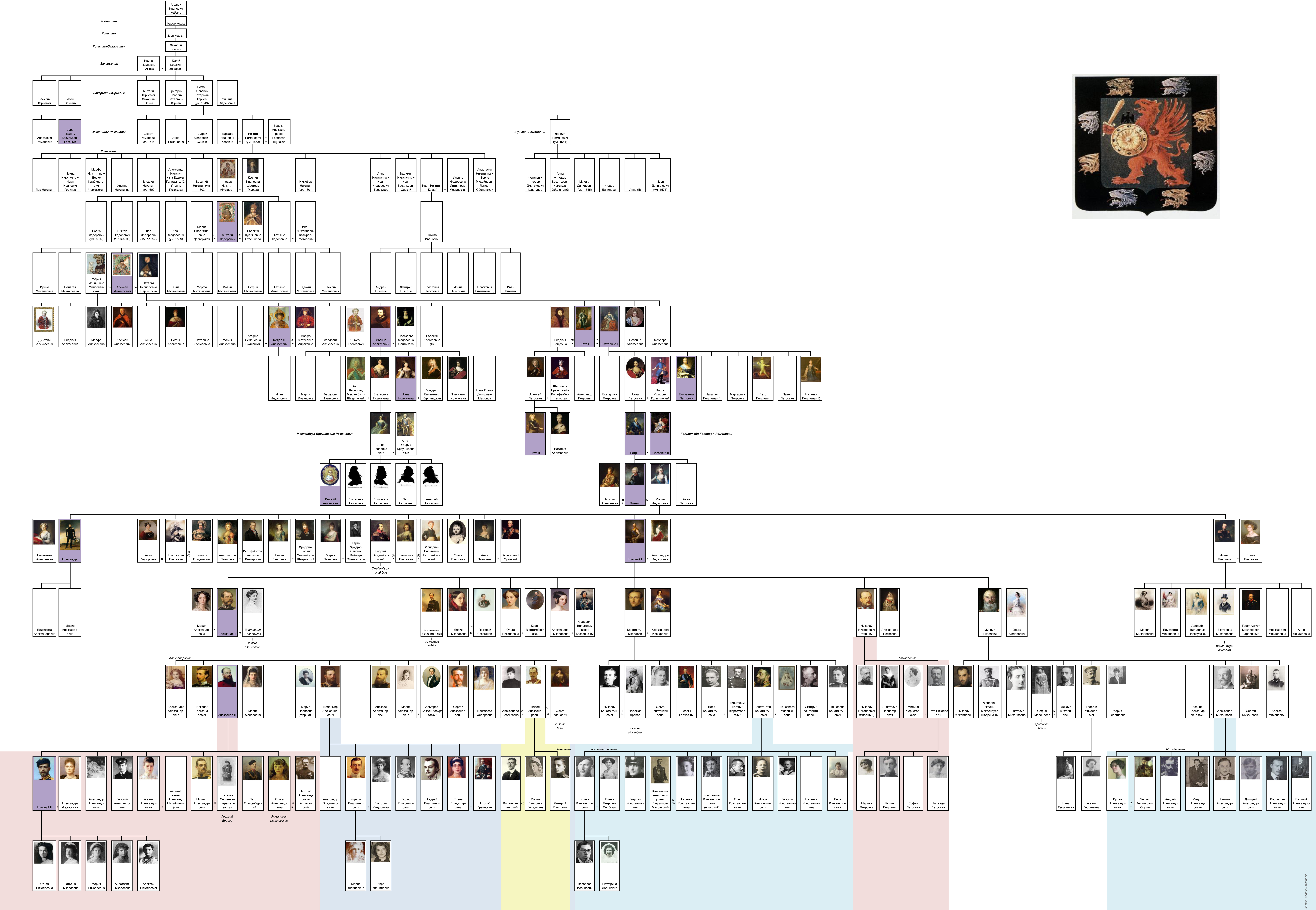 Генеалогическое древо дома Романовых (с 1347 по 1917 год: с возникновения боярской династии Захарьиных-Кошкиных-Романовых до Революции)